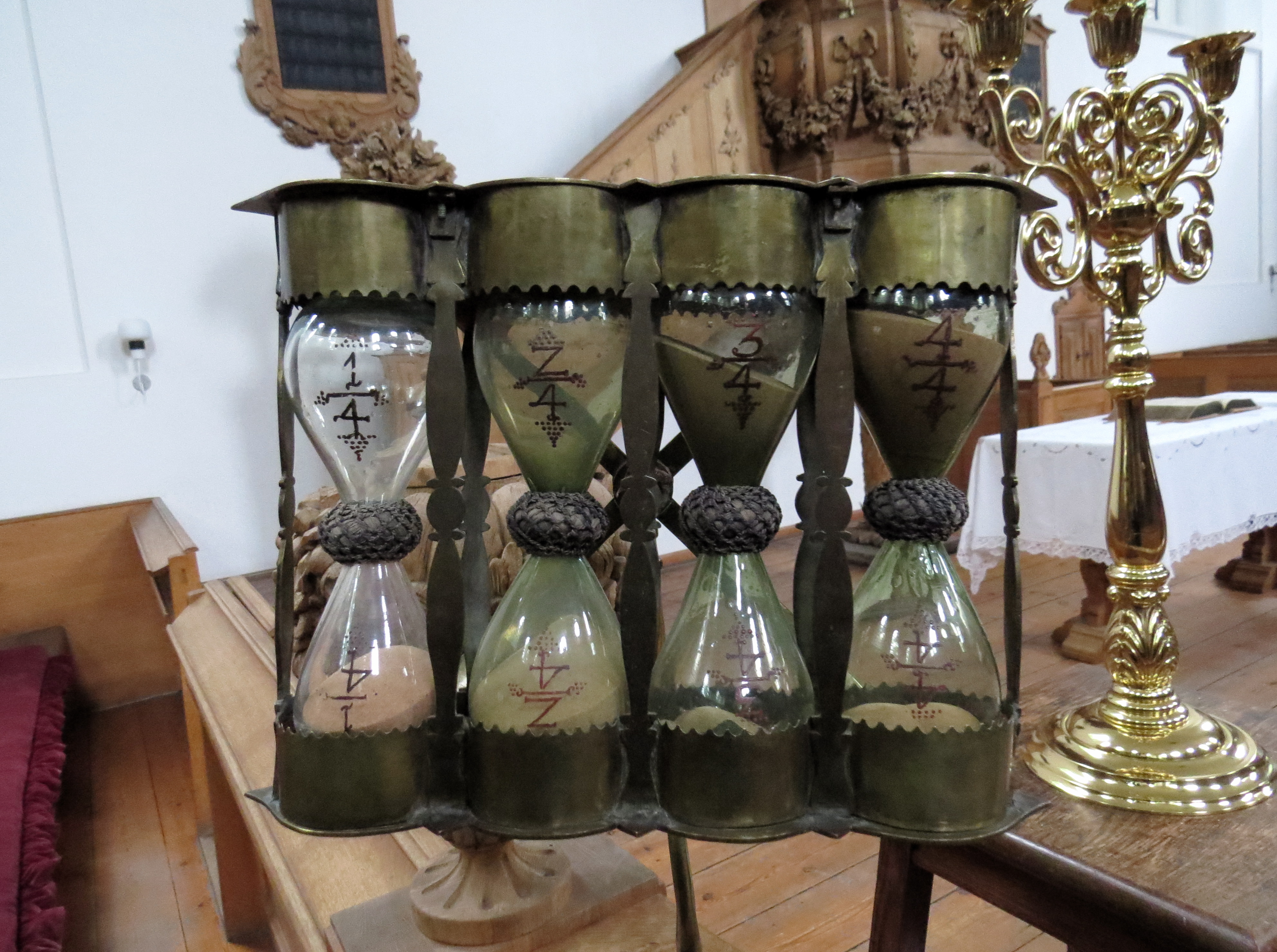 Timeglas i Reformert Kirke, København